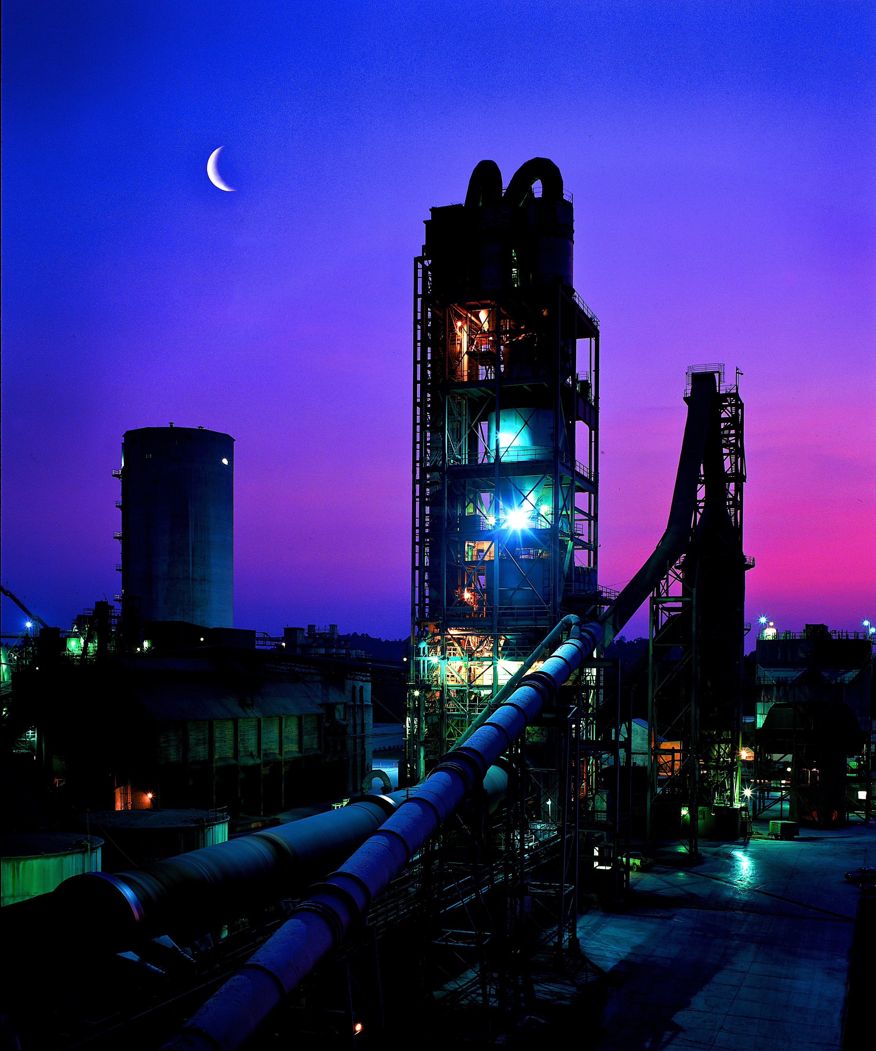 Cimenterie de Ragland, en Alabama aux États-Unis. Photo : © Janarbek Amankulov